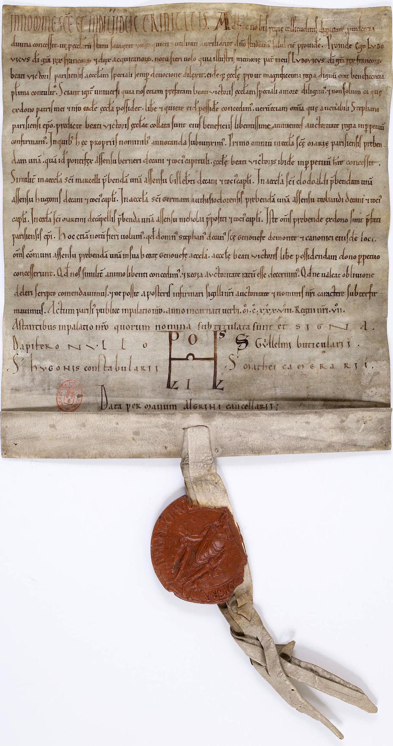 Charte du roi Louis VII confirmant des donations faites à l’abbaye de Saint-Victor, donnée à Paris en 1138 et scellée de cire rouge sur queue de parchemin.